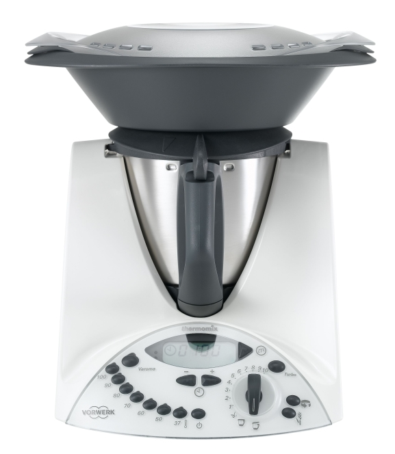 Freisteller Thermomix TM31 von Vorwerk